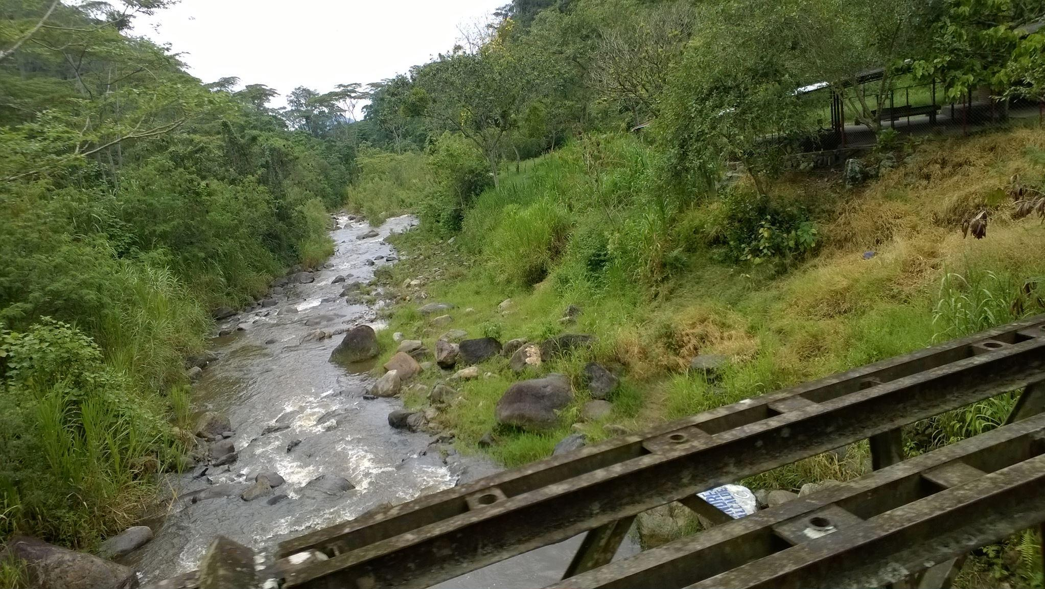 Río en Chinacota NS